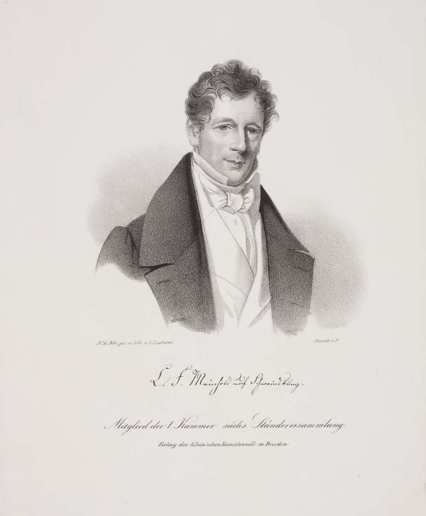 Gutsbesitzer in Schweinsburg (Vogtland), Mitglied der Ersten Kammer der sächs. Ständeversammlung 1832 bis 1852, 1787-1854